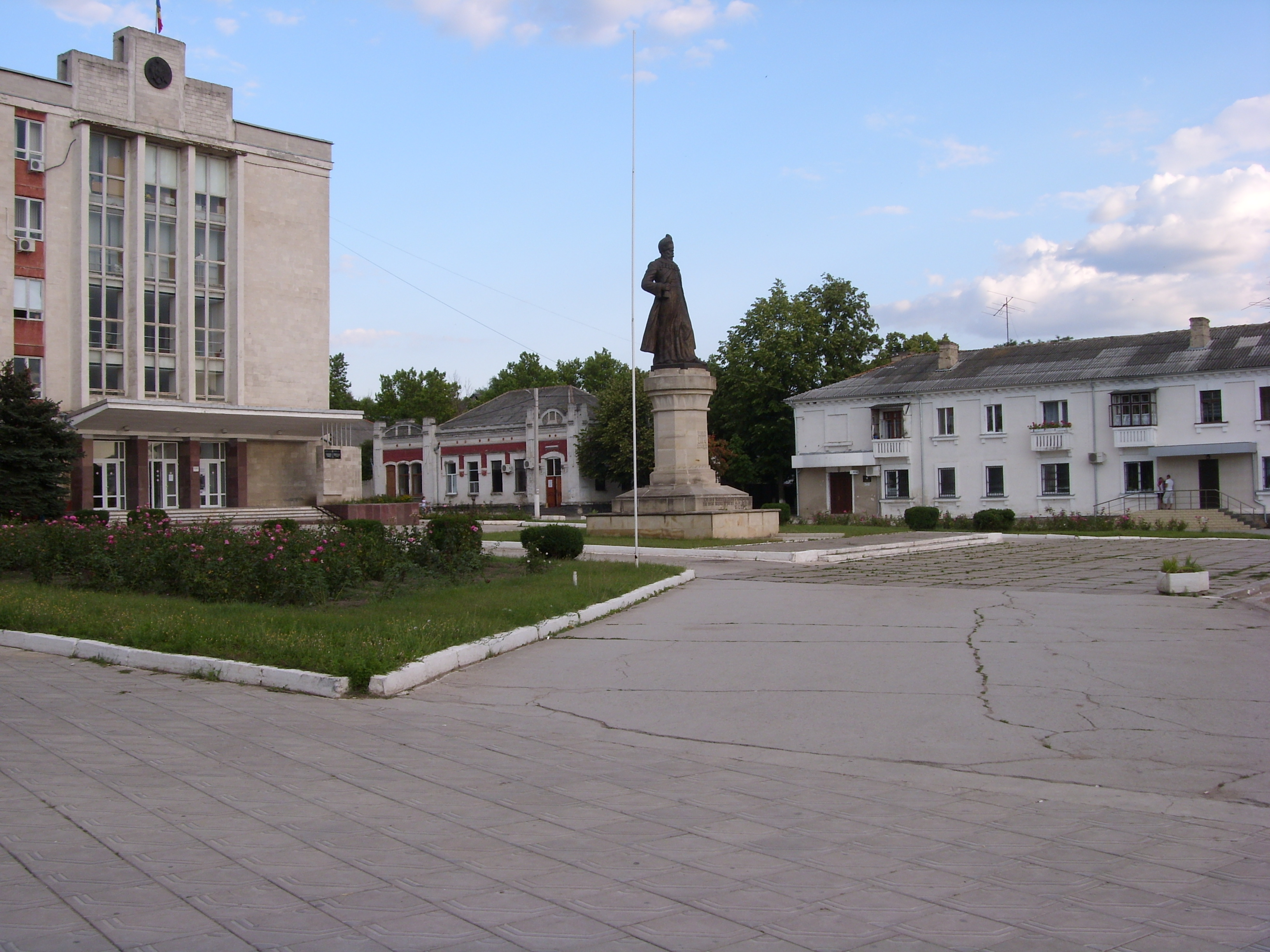 Центральная площадь в г. Оргеев